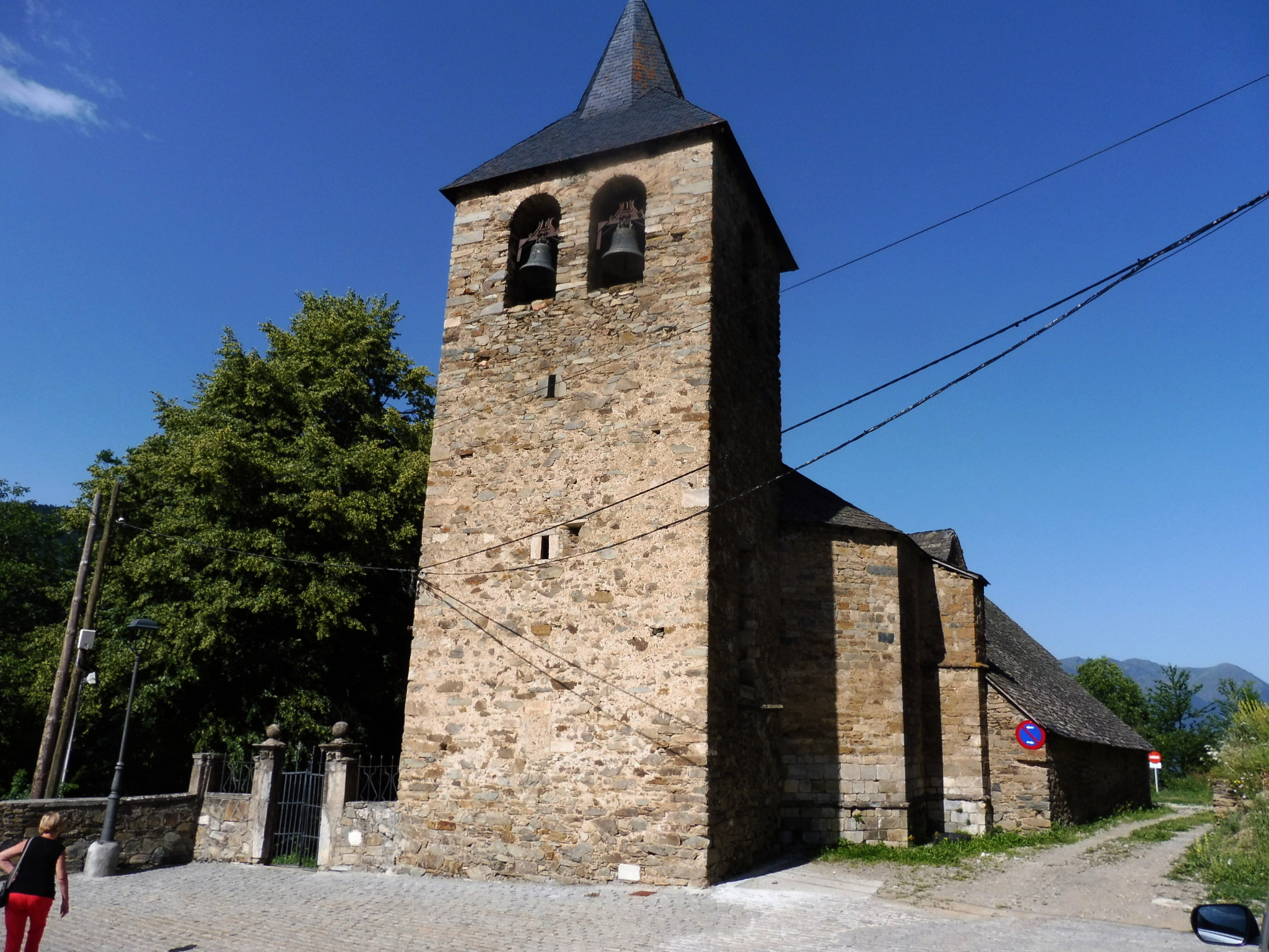 Església de Sant Esteve de Montcorbau (Vielha e Mijaran)